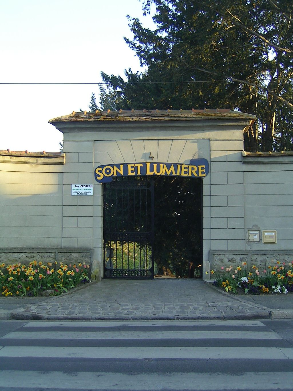 Parc des Cèdres Photo personnelle (own work) de Marianna